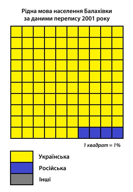 Інфографіка розподілу населення смт Балахівка Петрівського району за рідною мовою згідно з даними перепису 2001 року. Джерело: Розподіл населення Кіровоградської області за рідною мовою (у % до загальної чисельності населення) за переписом 2001 року